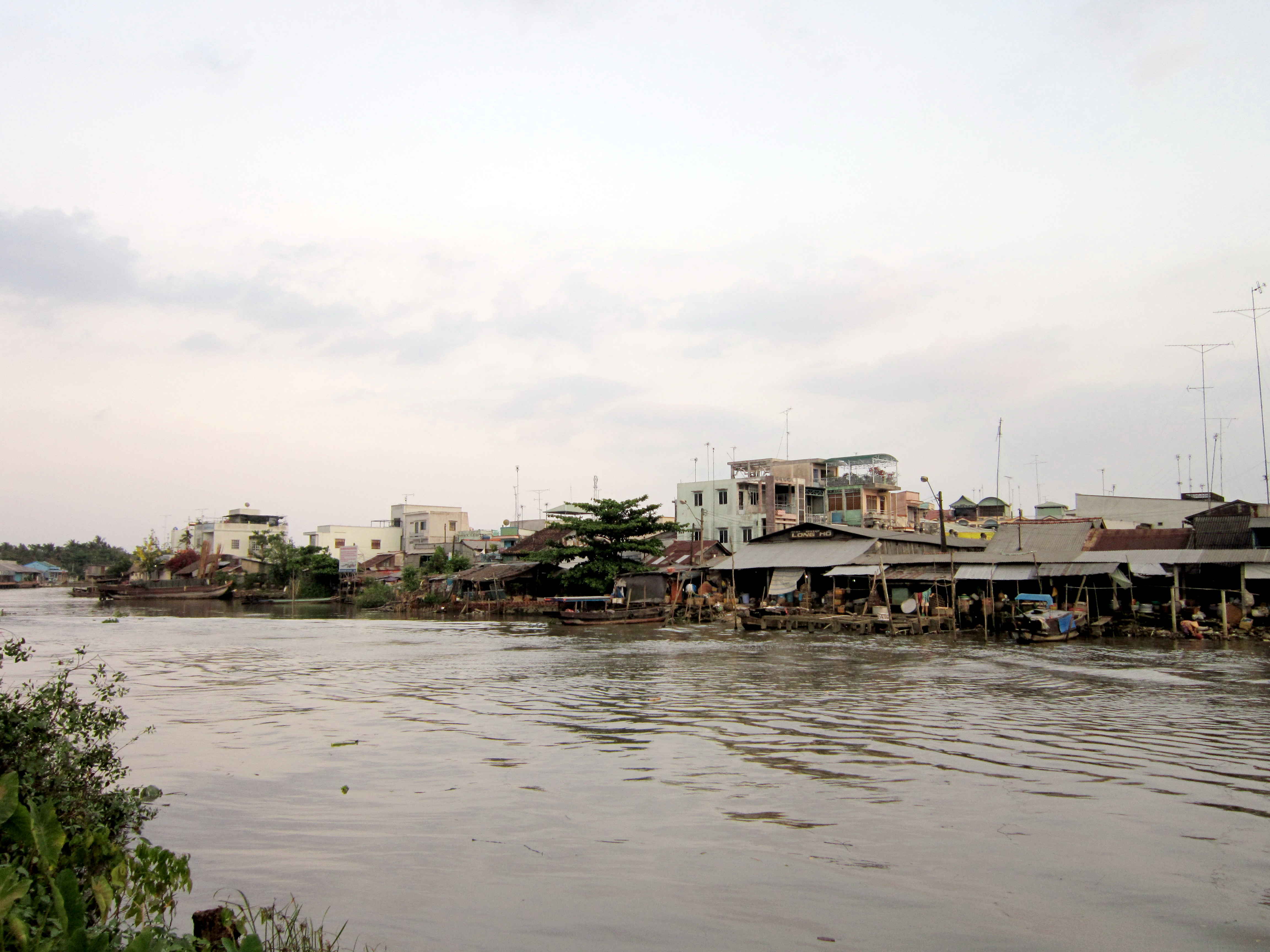 Sông Long Hồ, đoạn tại thị trấn Long Hồ, huyện Long Hồ, tỉnh Vĩnh Long (Việt Nam).